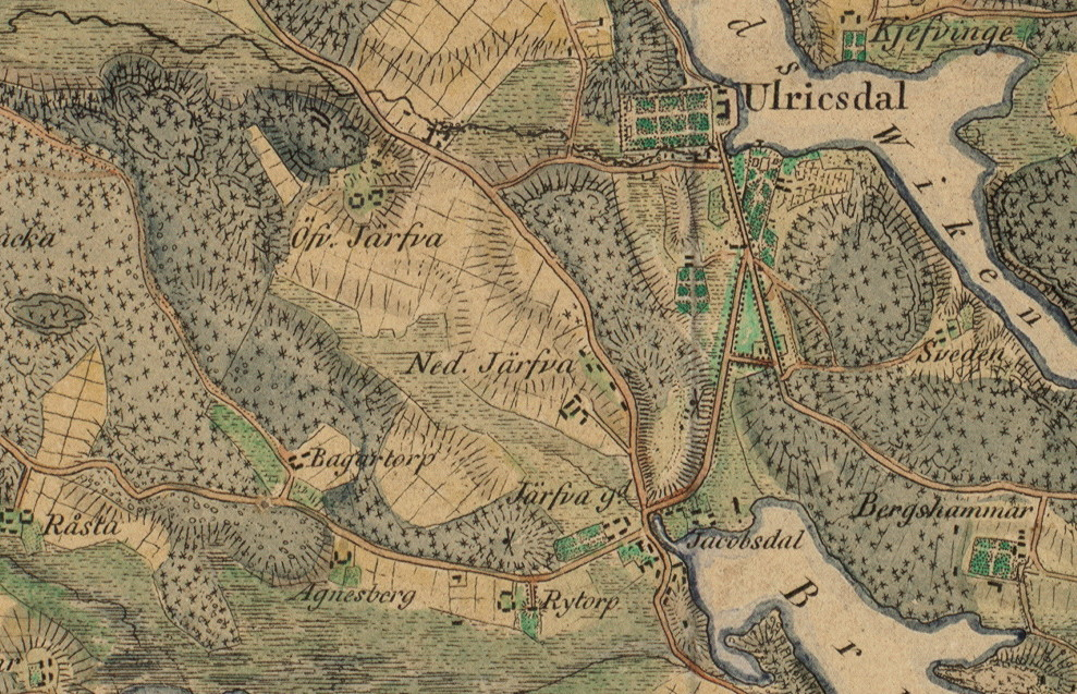 Del av Karta öfver Belägenheten omkring Stockholm / utgifven af W. M. Carpelan 1817 visande Övre, Nedre och Järva gård